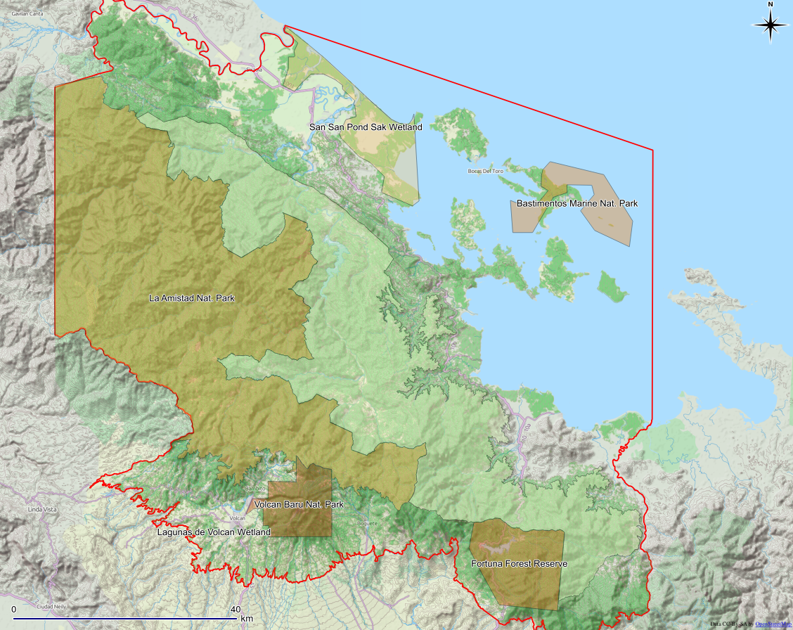 La Reserva de la Biosfera La Amistad Panama contiene 7 áreas protegidas, una de ellas, el Bosque Protector Palo Seco (verde claro al norte de Fortuna y NW del PN La Amistad) es considerada como una parte de la zona de amortiguamiento de la reserva. El resto de las áreas protegidas son consideradas zonas núcleo de la reserva.